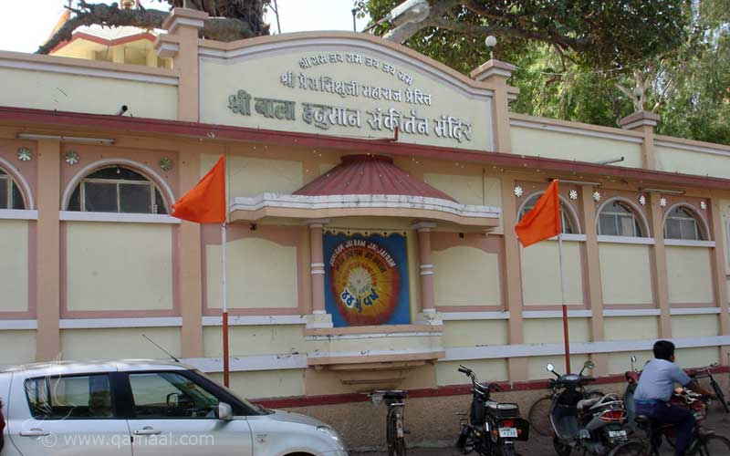 Shree Bala Hanuman Sankirtan Mandir Jamnagar